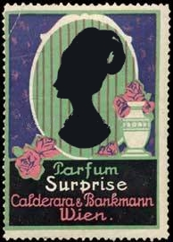 Parfum Surprise. Calderara & Bankmann, Wien. Größe 5x4 cm.